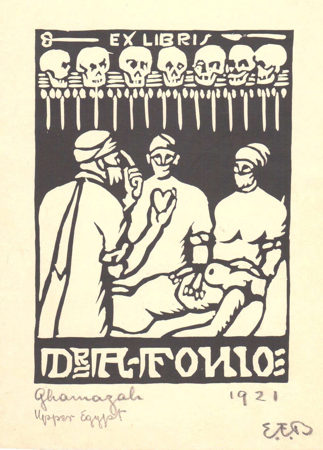 Ex Libris von Prof. Dr. Antonio Fonio entworfen durch Erwin Friedrich Baumann